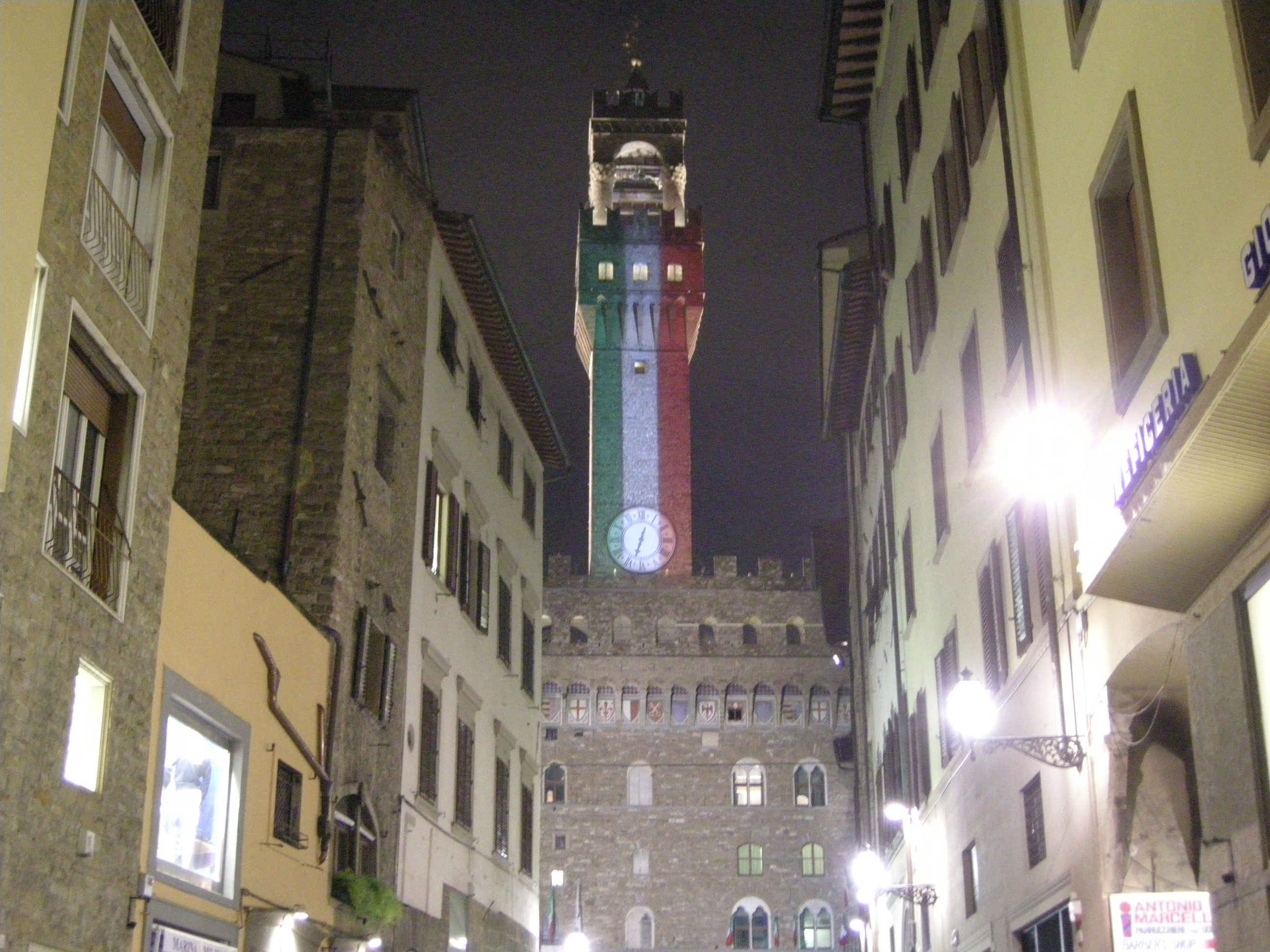 Firenze, serata tricolore, palazzo vecchio